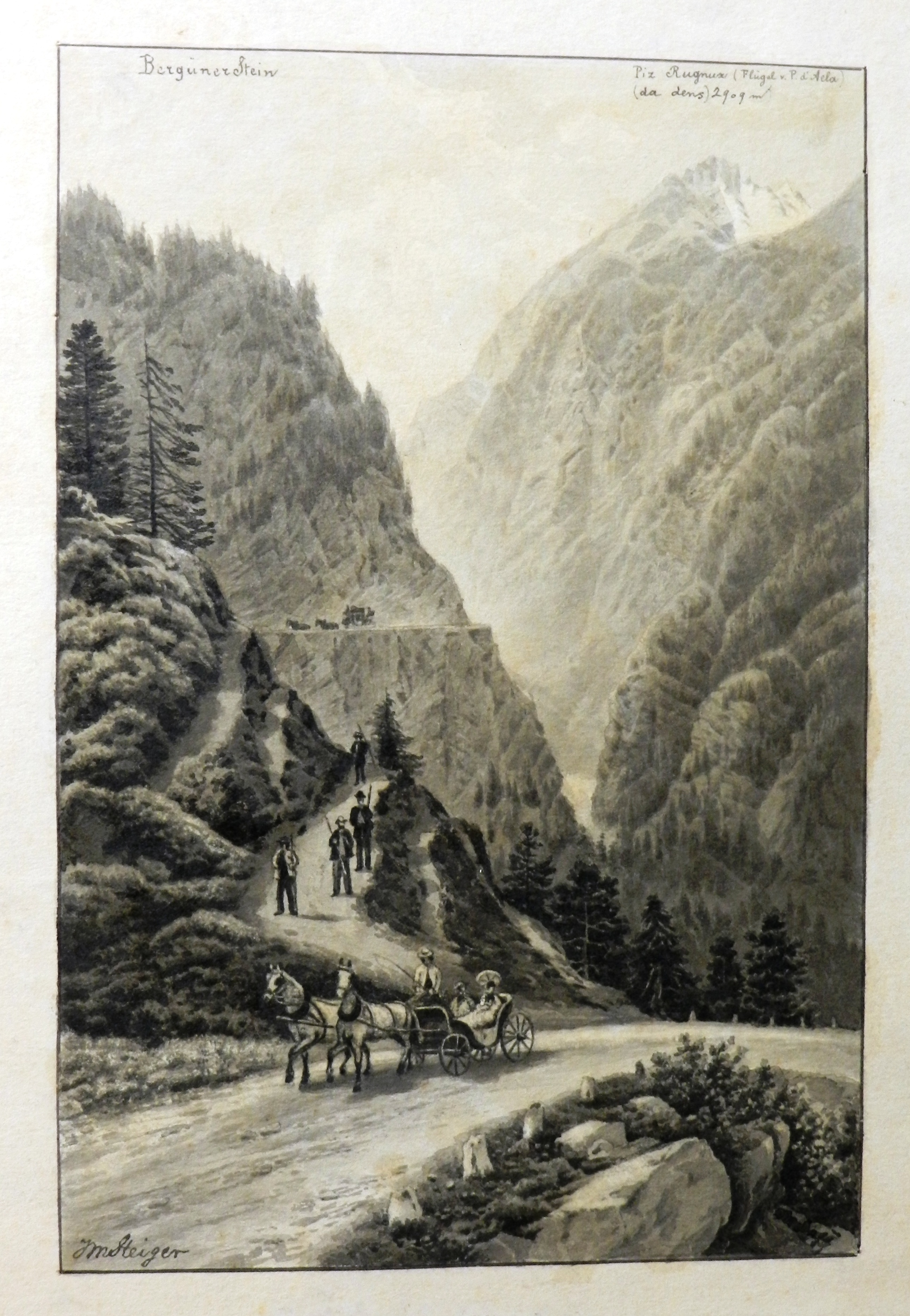 Der Appenzeller Maler Johann Martin Steiger (1829-1899) malte in den 1880er und 1890er Jahren zahlreiche Alpenszenen. Darunter befindet sich diese Ansicht des Bergünersteins von Norden, auf der die 1855-57 gebaute Kantonsstrasse zu sehen ist. Im Mittelgrund ist die Strasse von 1696 sichtbar.